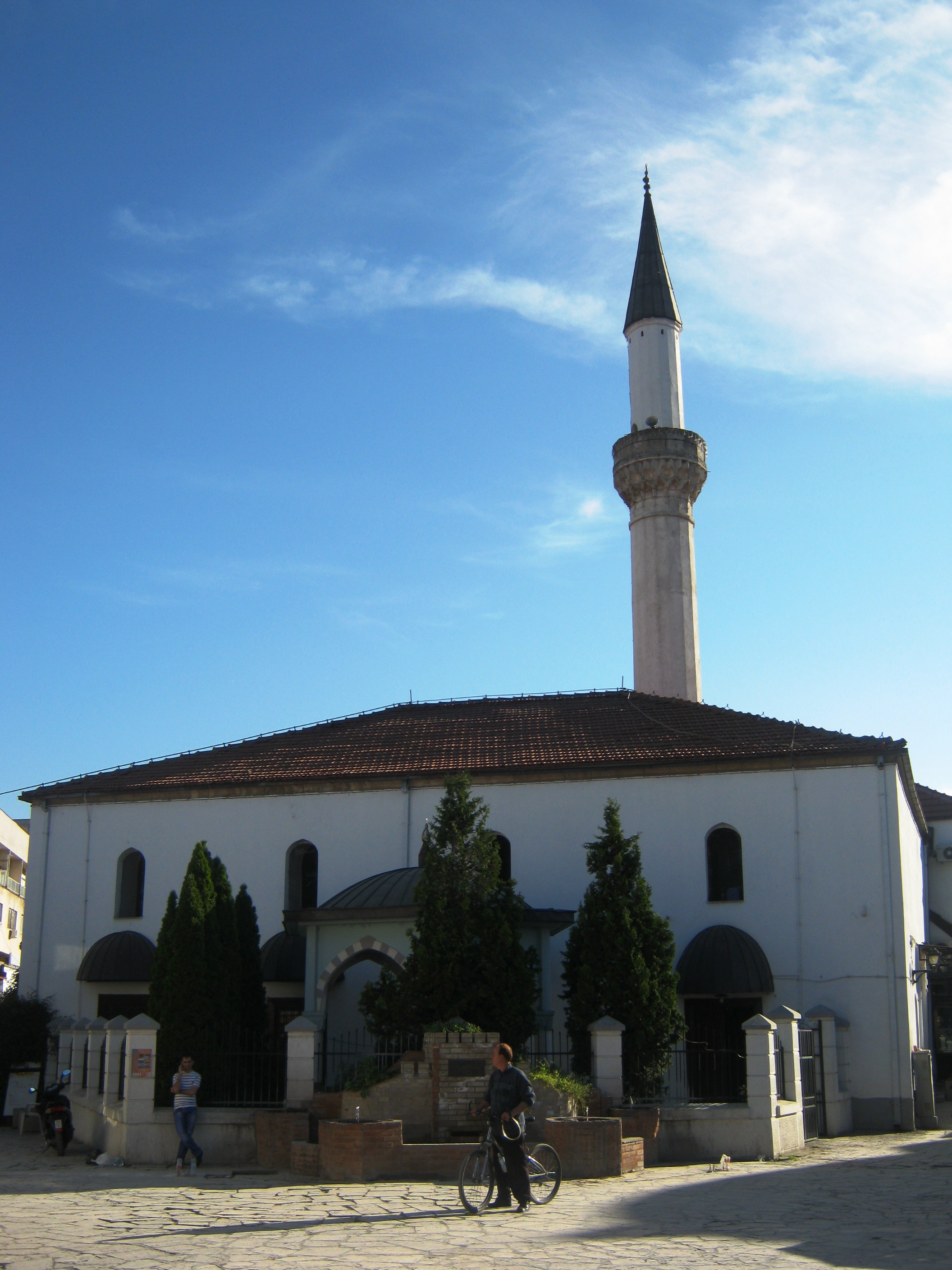 Мурат-пашина џамија во Скопје